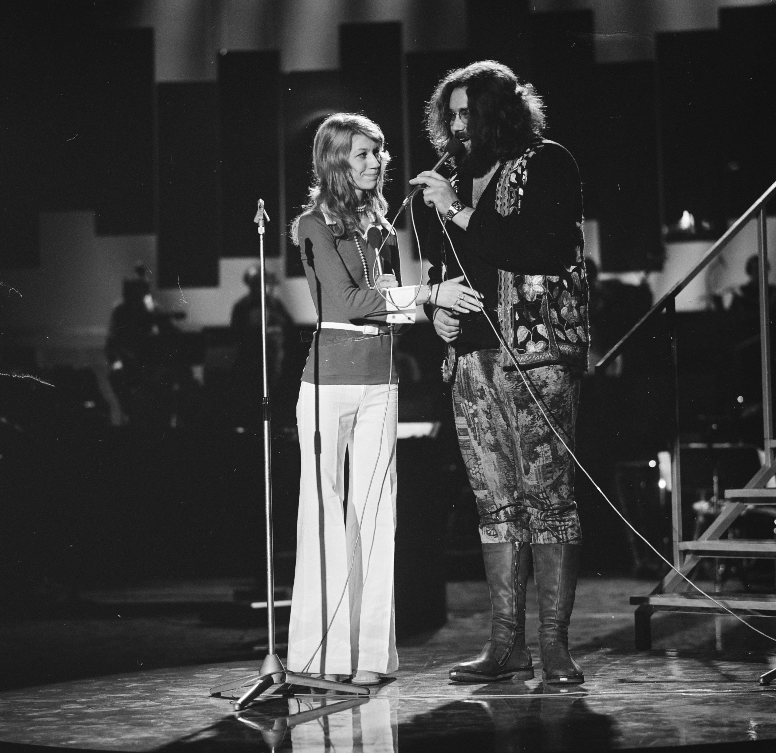 Mouth en McNeal repeteren voor het Nationaal Songfestival. Repetitie Jaarbeurs Congrescentrum Utrecht